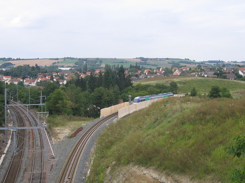 Autorail AGC effectuant la liaison Clermont-Ferrand - Lyon emprunte le raccordement d'évitement de la gare de Saint Germain des Fossés.